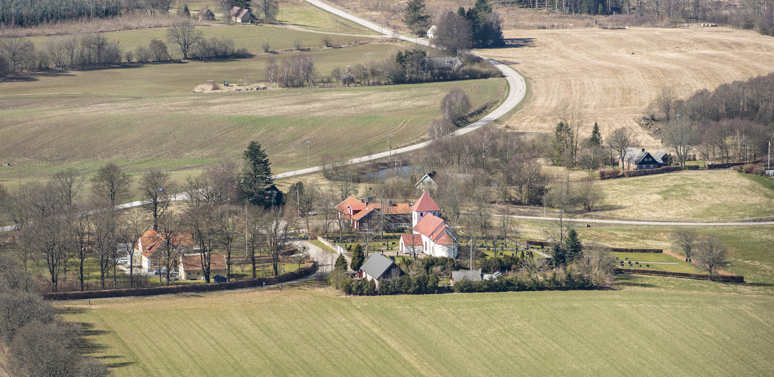 Konga kyrka, kyrkomiljö